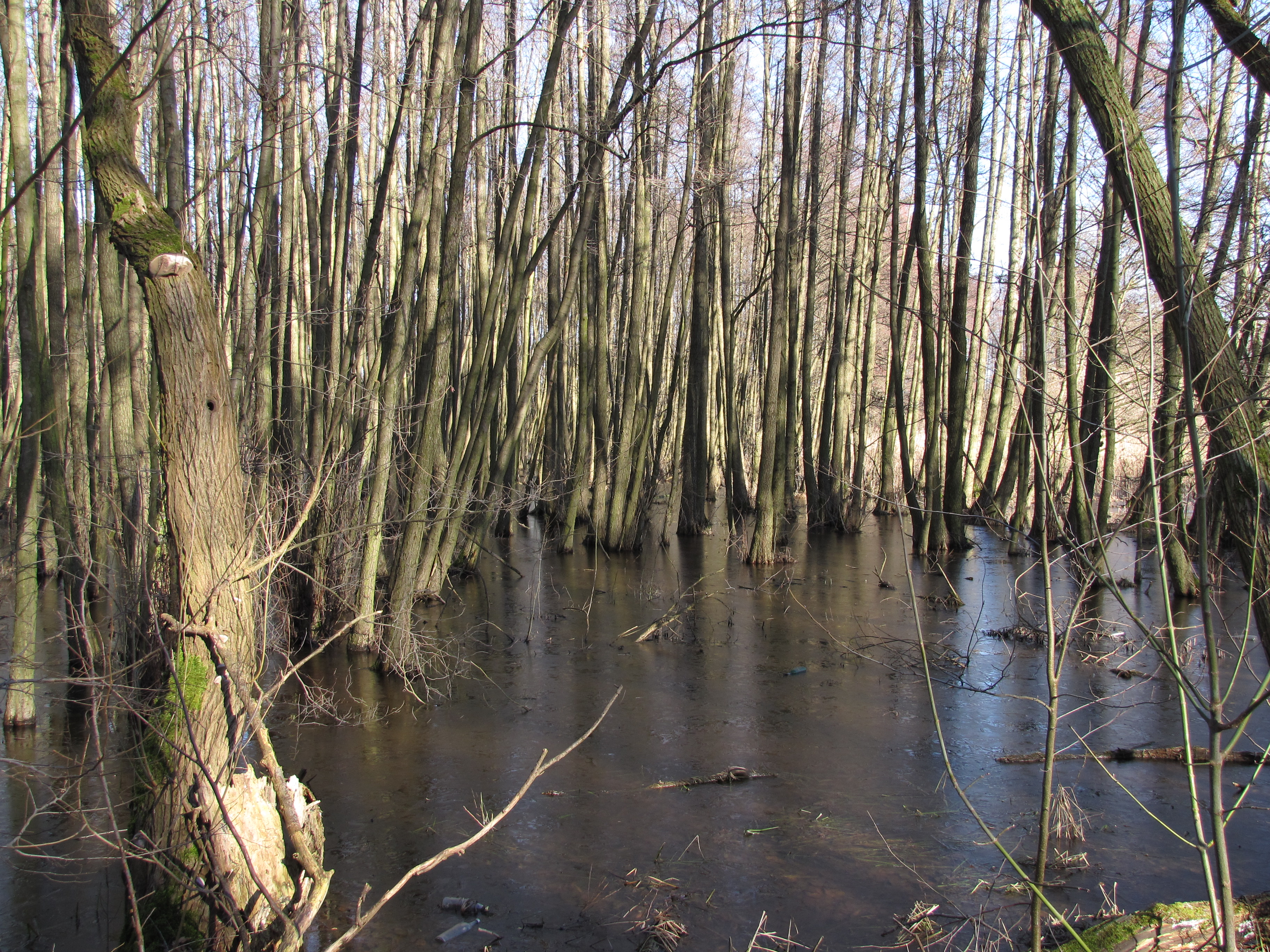 Bruchwald des Groß Machnower Sees, östlich von Pramsdorf, Groß Machnow, Gem. Rangsdorf, Brandenburg